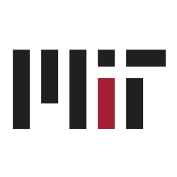 MIT-social-media-logo-white